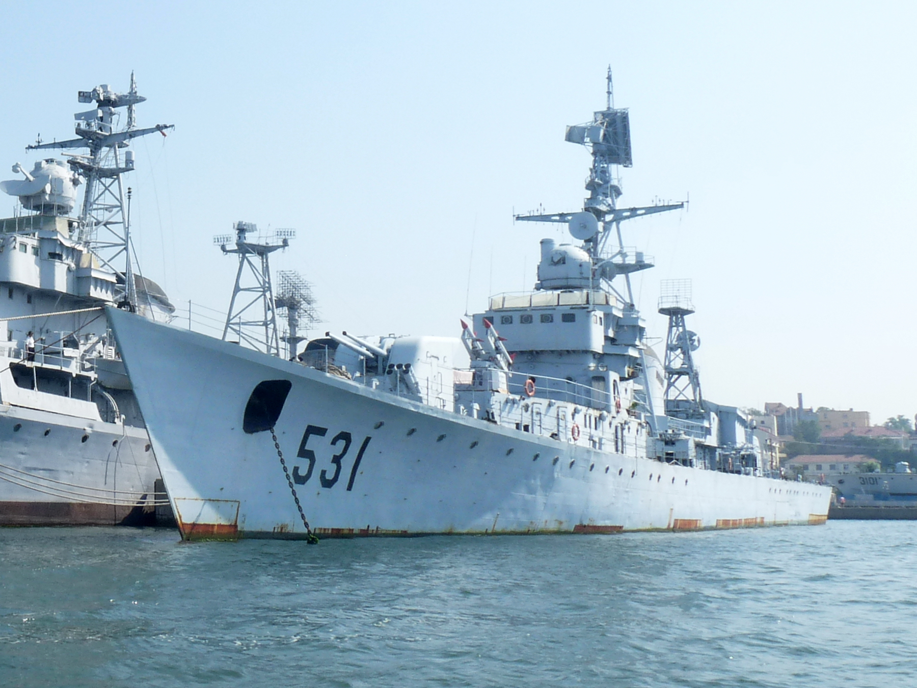 退役后存放在青岛的中国海军博物馆的053K型导弹护卫舰“鹰潭”号（舷号531）